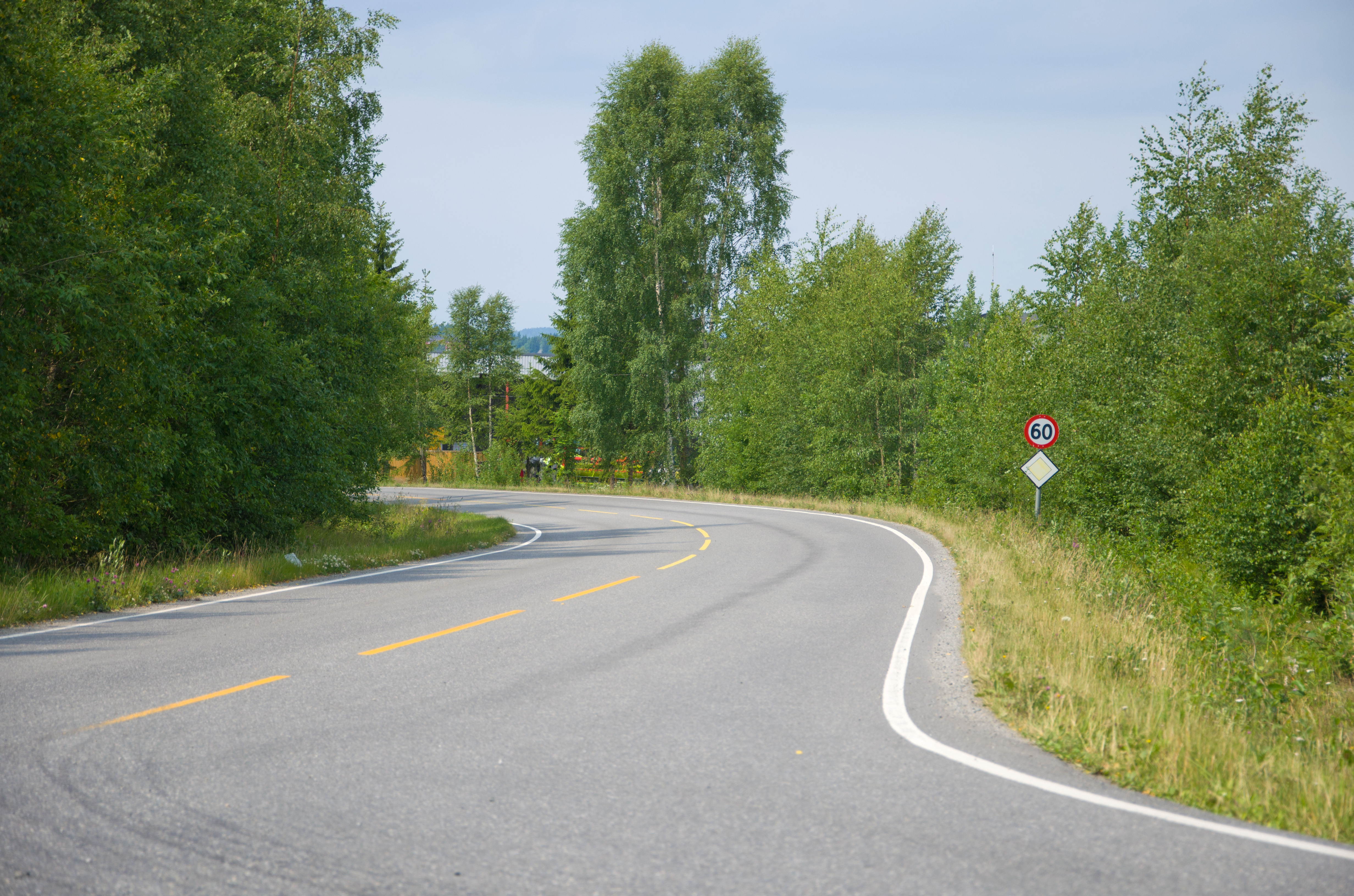 Fylkesvei 1748 (tidl. 66) Møllebruvegen i Hedmark